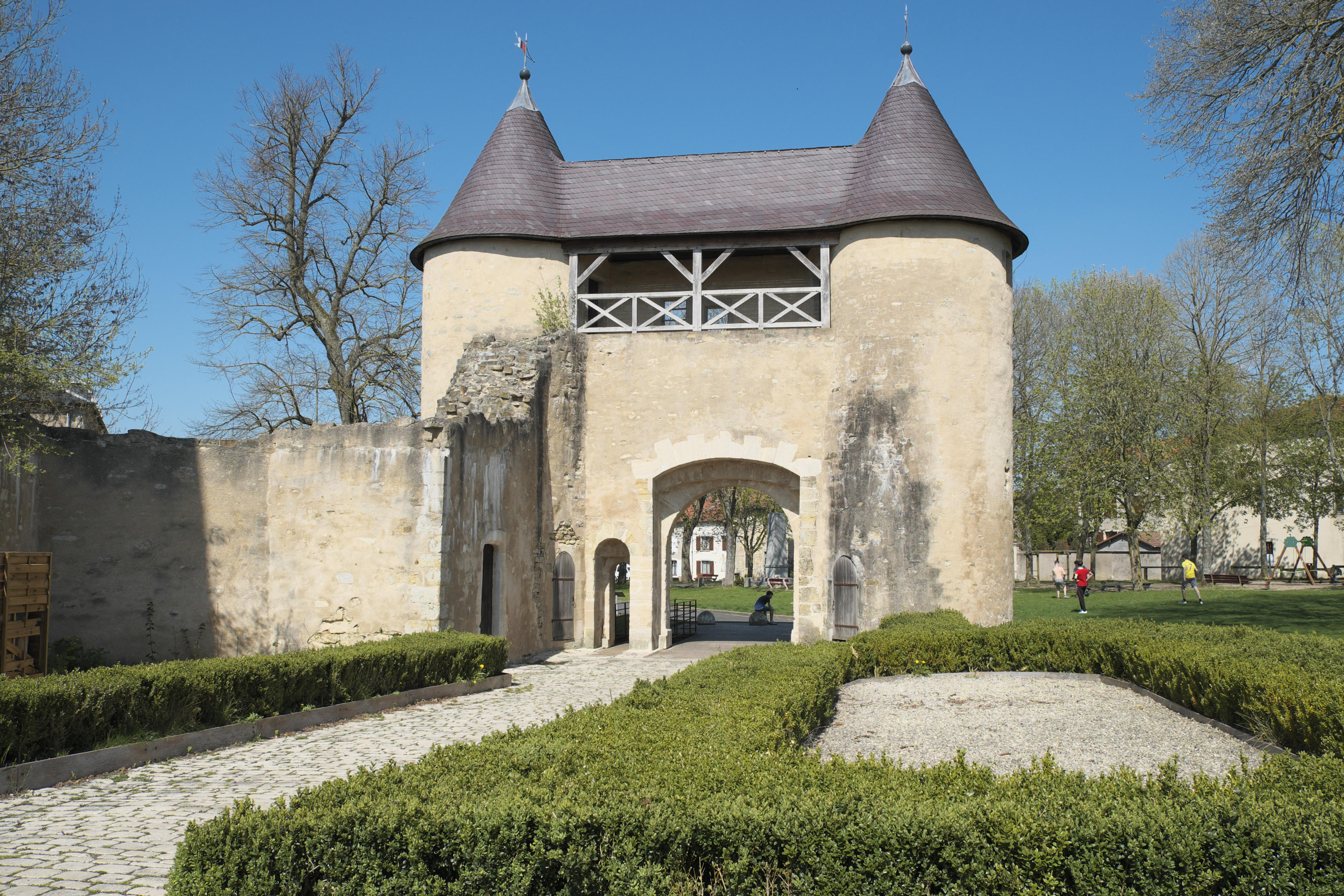 Château (Schloss) in Vic-sur-Seille im Département Moselle in der Region Grand Est/Frankreich